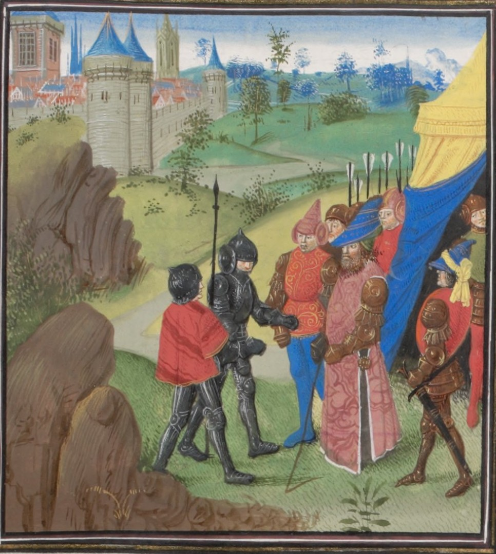 Bibliothèque de Genève Ms. fr. 85- 057r. William of Tyre, History of the Crusades translated into French, with an anonymous continuation to the year 1229